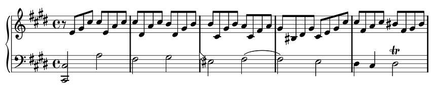 Première ligne de l'étude opus 13 n° 8 de APF Boëly.